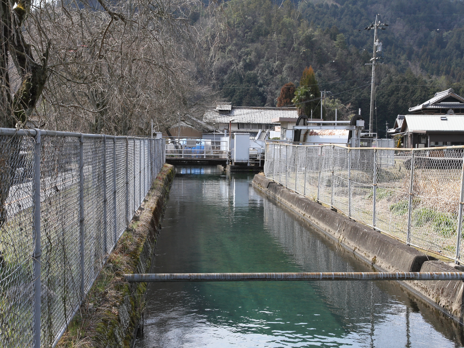 井ノ面発電所（岐阜県）の水路。発電所側に向かって撮影。